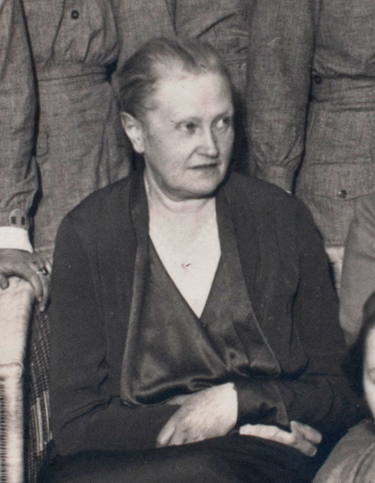 Jenny af Forselles